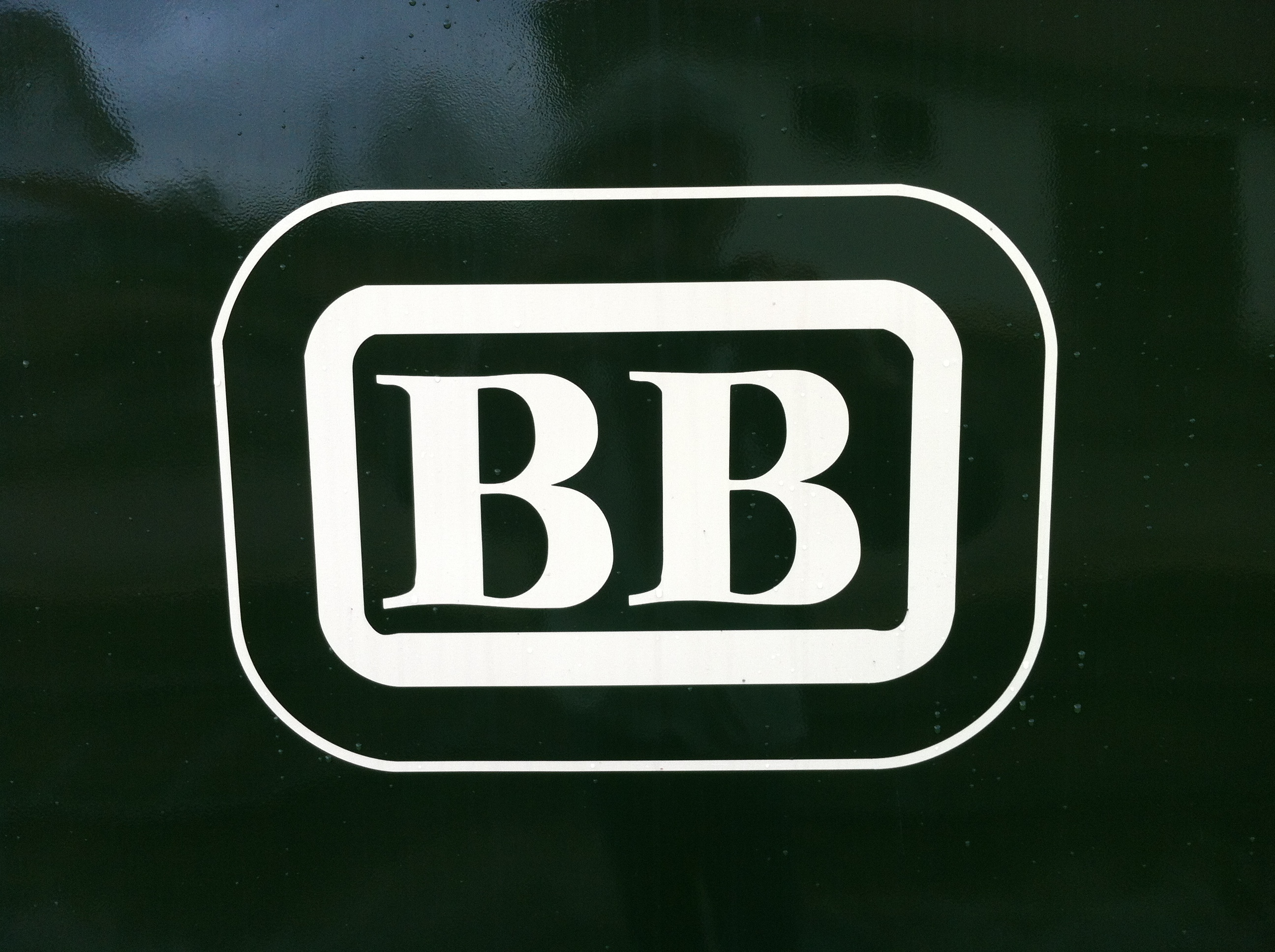 Bahnbetriebe Blumberg GmbH, im Eigentum der Stadt Blumberg, Betreiberin der Museumsbahn/Wutachtalbahn. Logo auf Eisenbahnwagen.